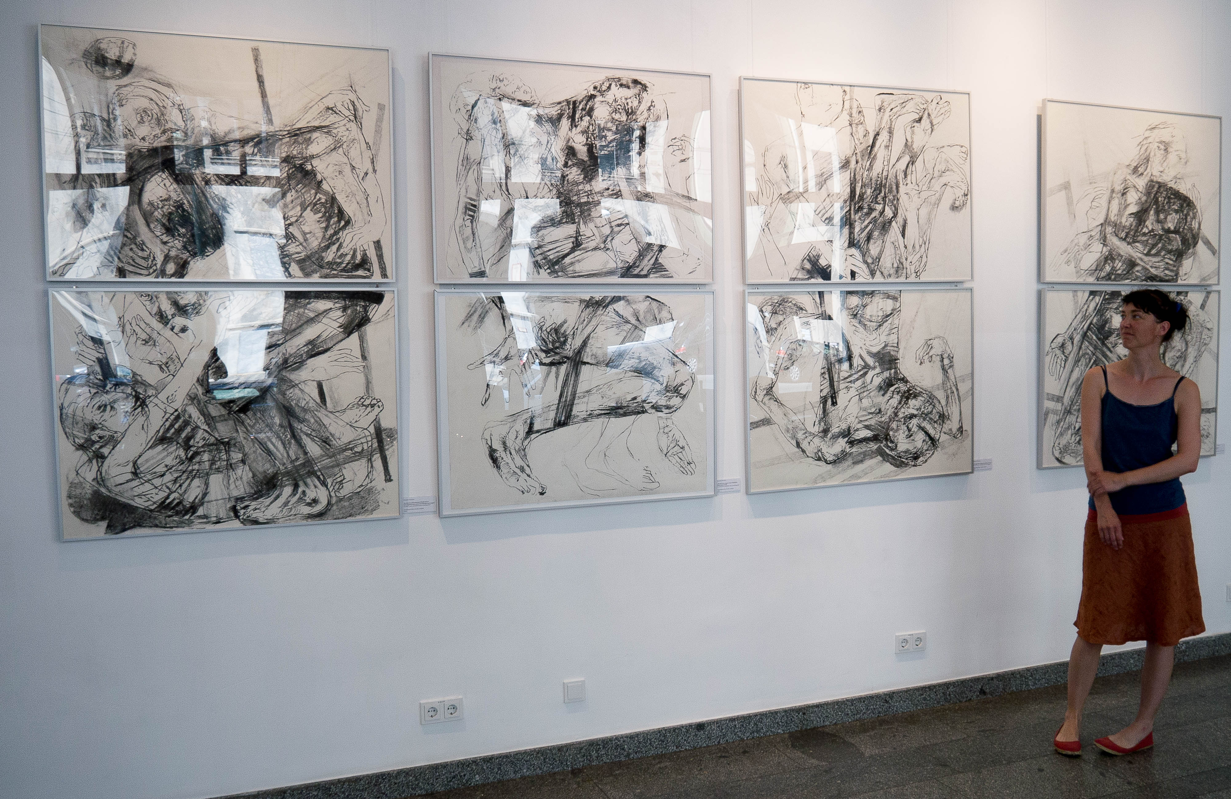 Ausstellungseröffnung Susanne Theumer im Brecht Haus Berlin